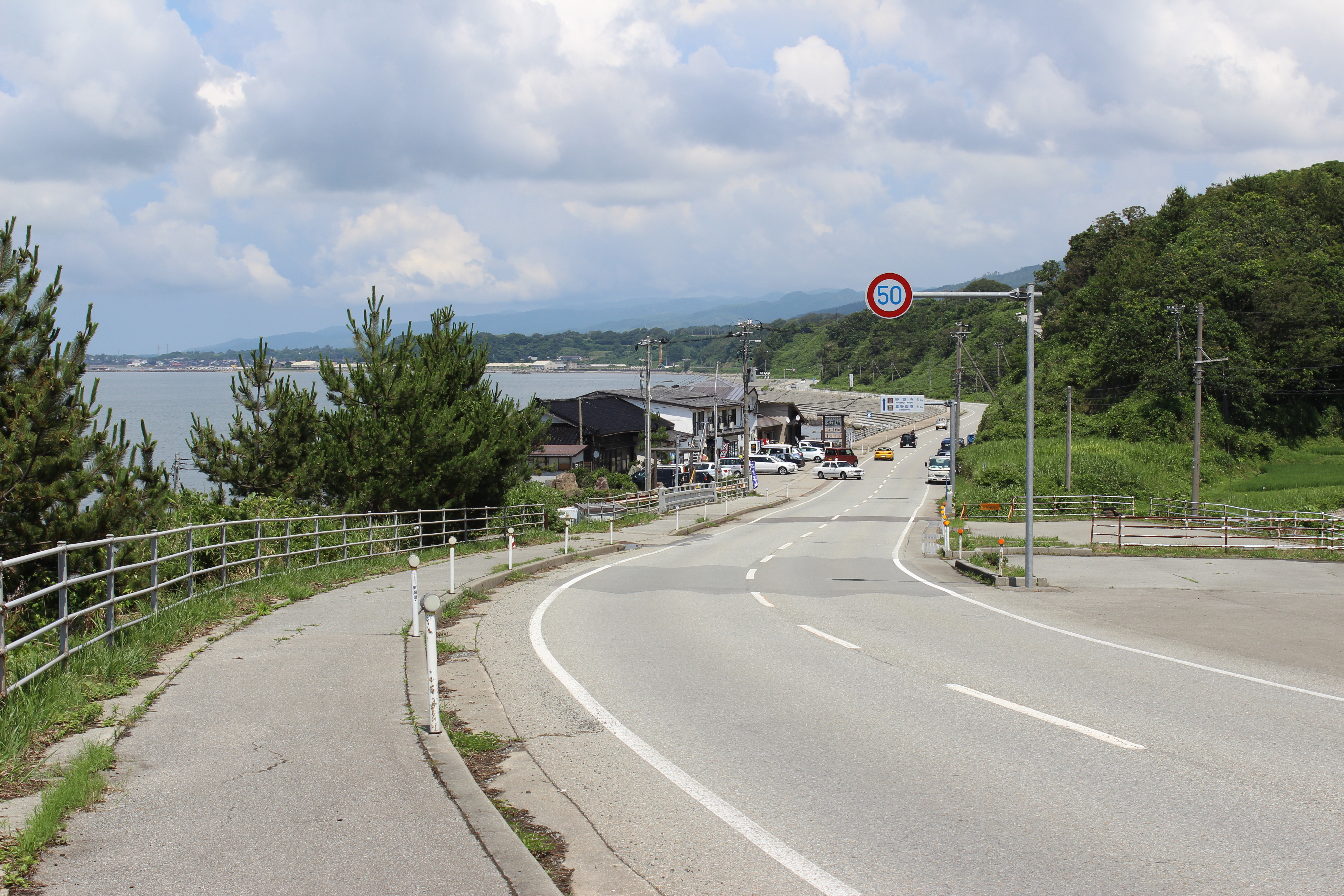 国道350号。佐渡市大須鼻付近。